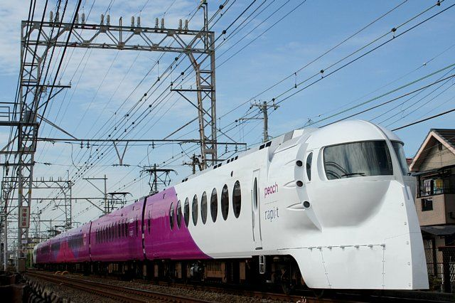 岸和田市加守町：南海本線春木・和泉大宮間走行中